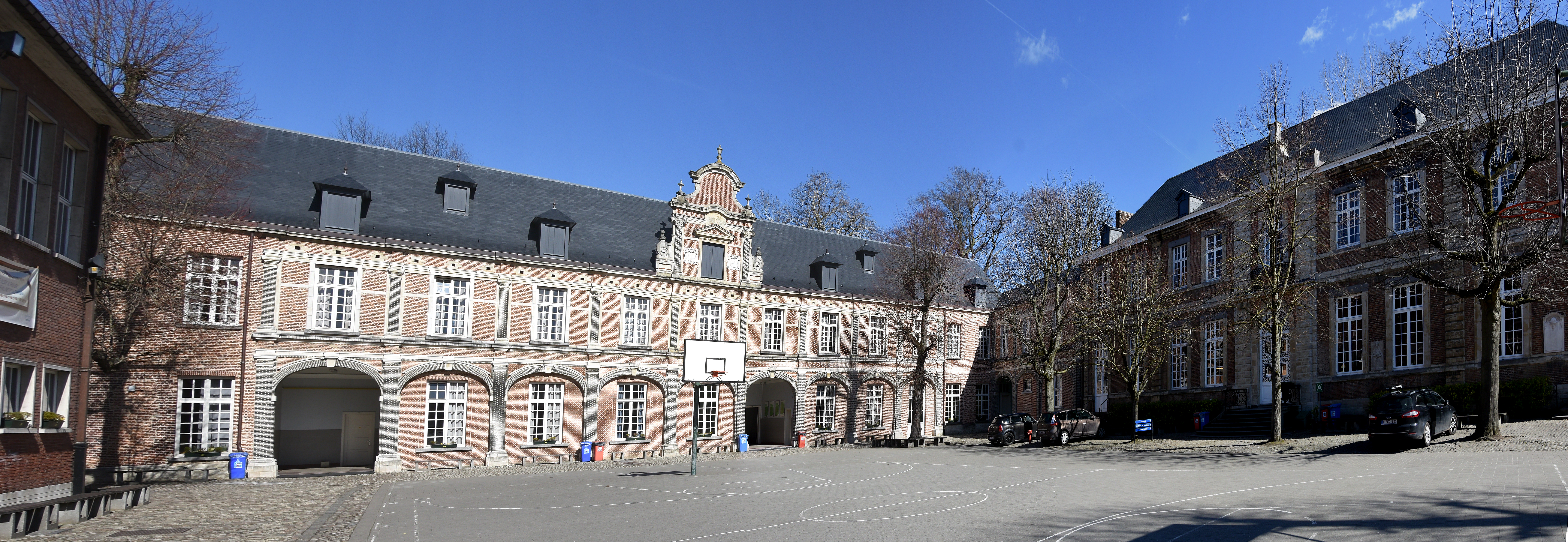 Pitzemburg, Mechelen, België